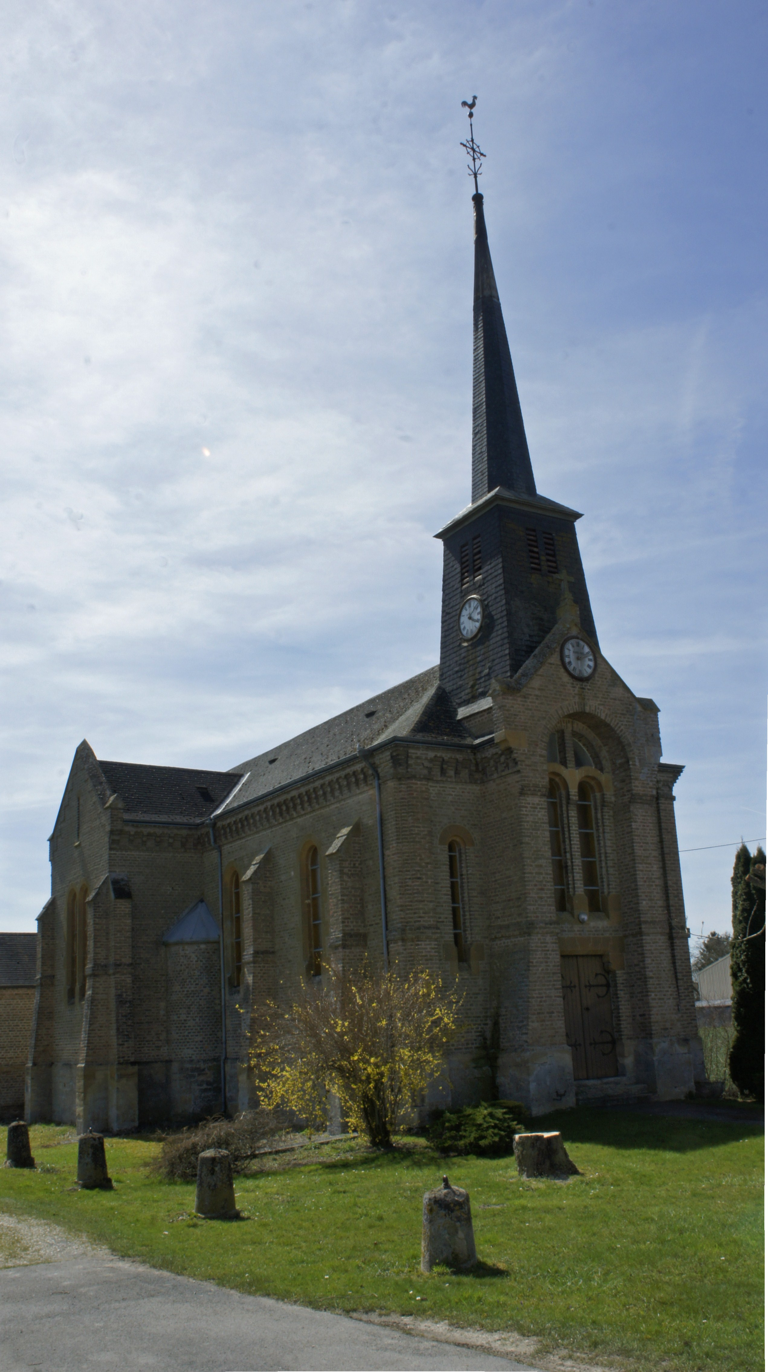 vUE DE L'église de Mont saint remy .